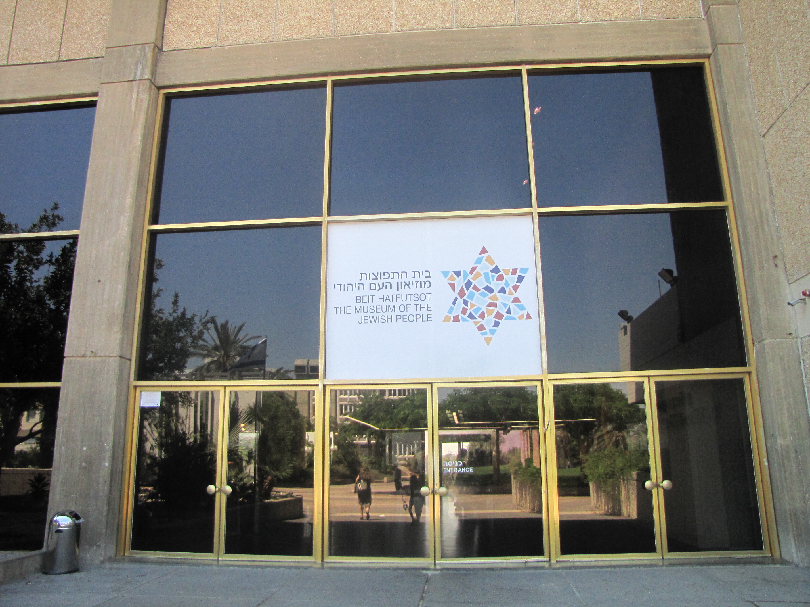 Beyt ha-Tefutsoth